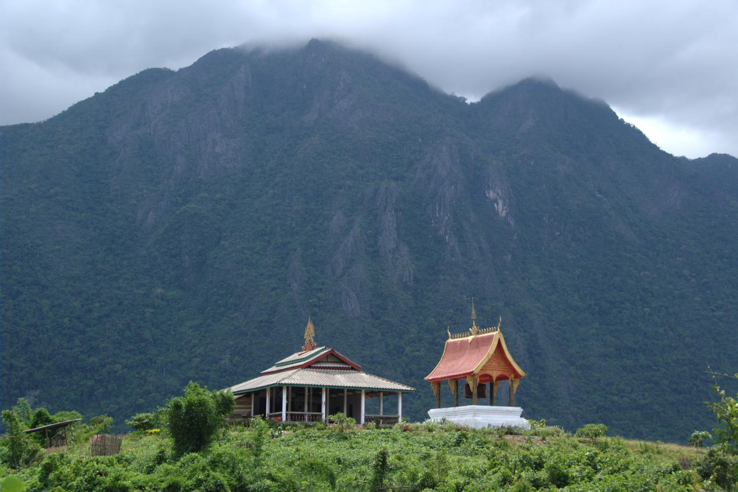 Vang Vieng, Laos